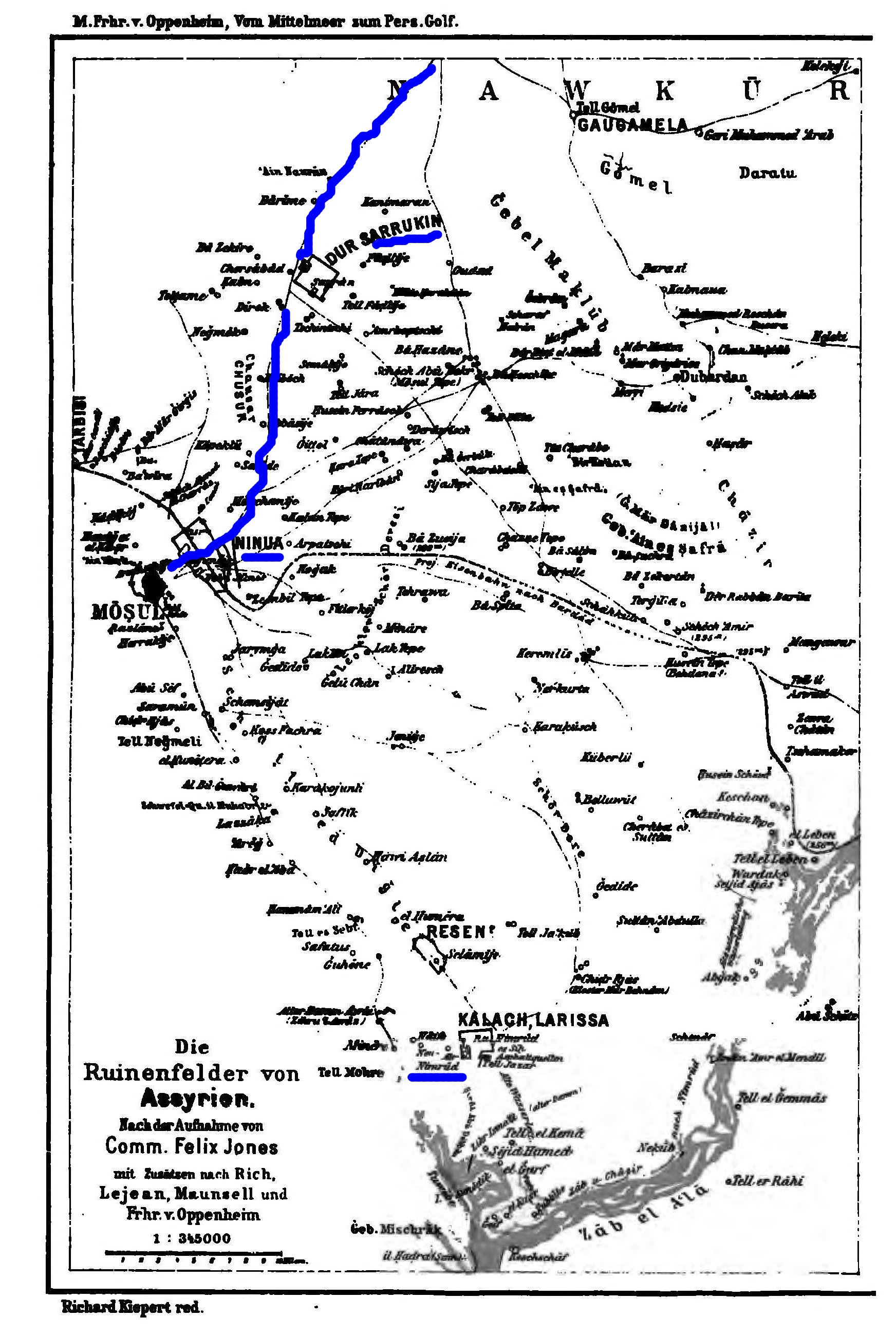 Karte nach der Aufnahme von Comm. Felix Jones – bearbeitet von Mannuell Lejoan und Frhr. V. Oppenheim